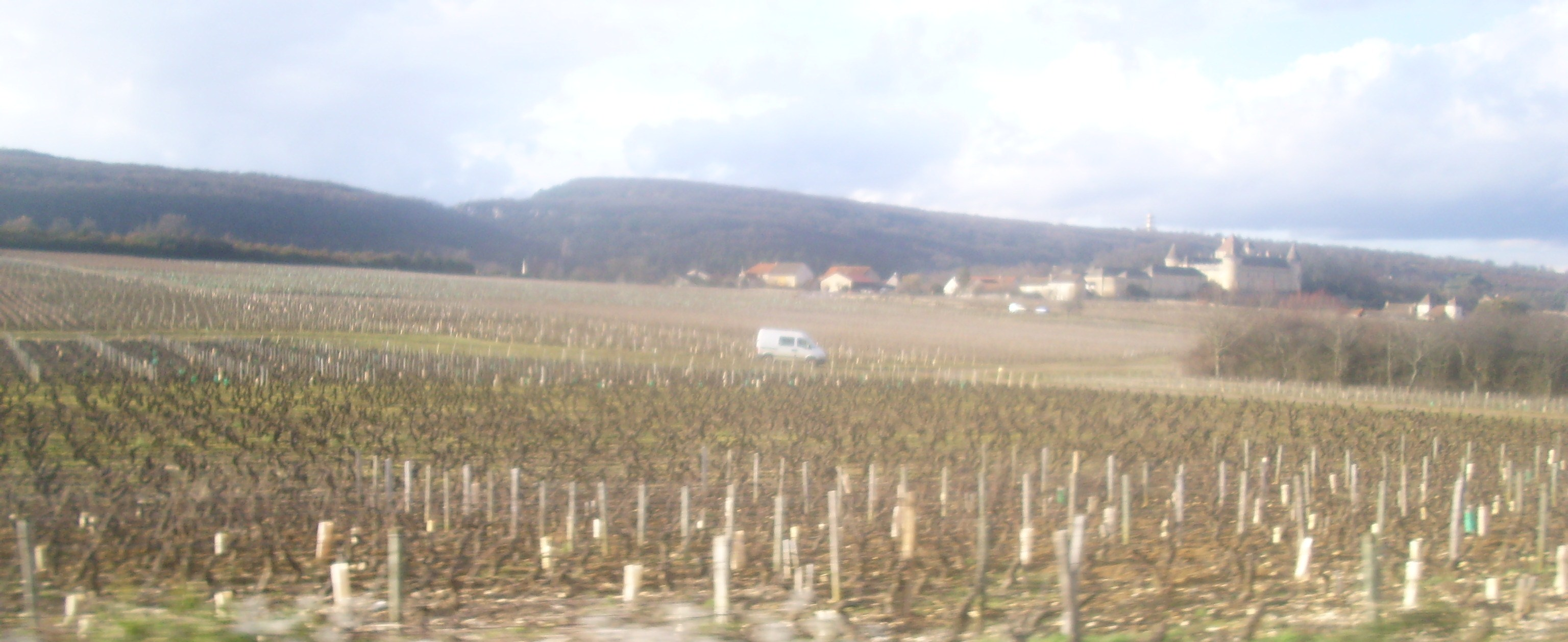 Vue d'une partie du vignoble de Rully (vers le lieux-dit des Cloux l'Ouvrier)